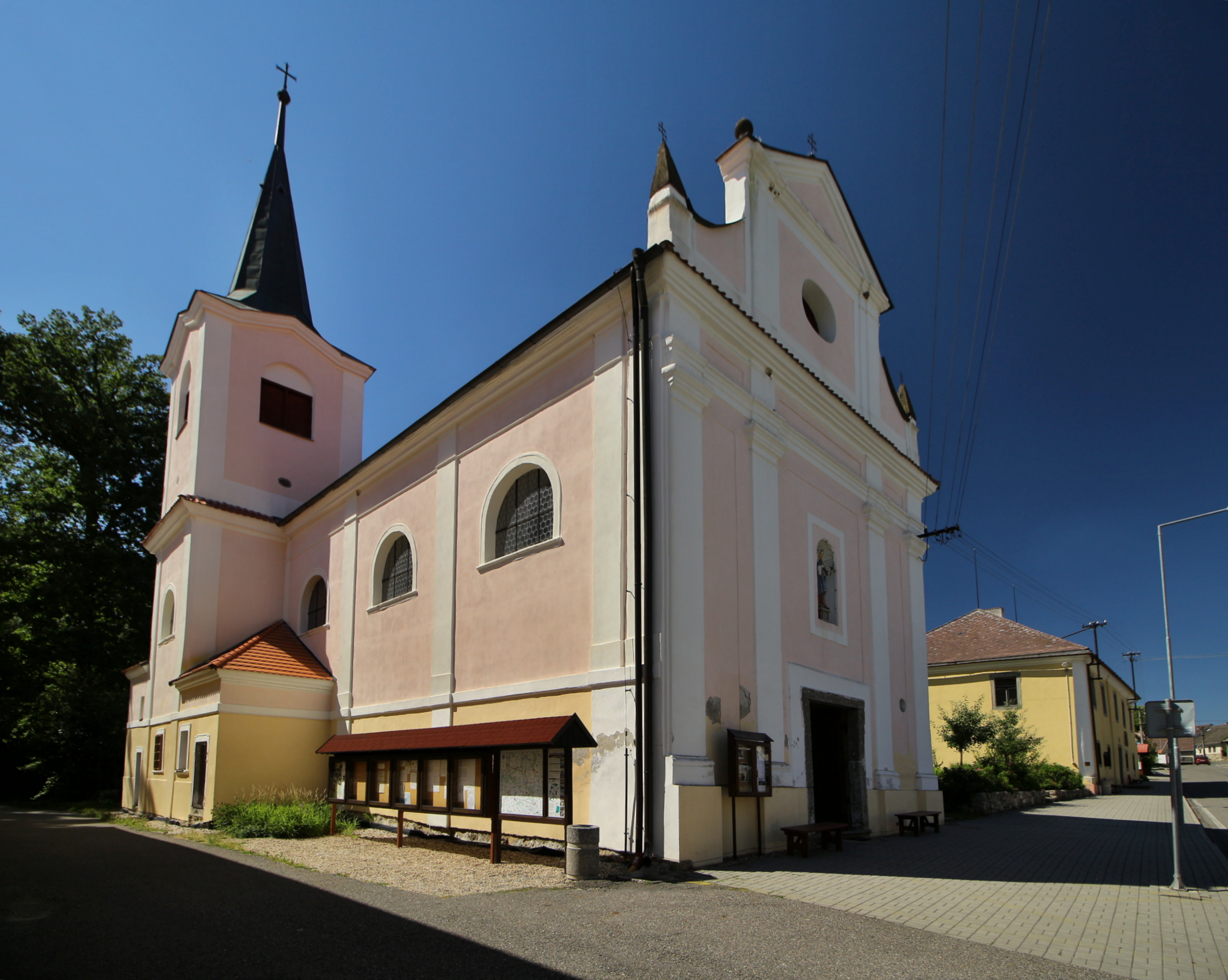 Nadějkov, kostel Nejsvětější Trojice